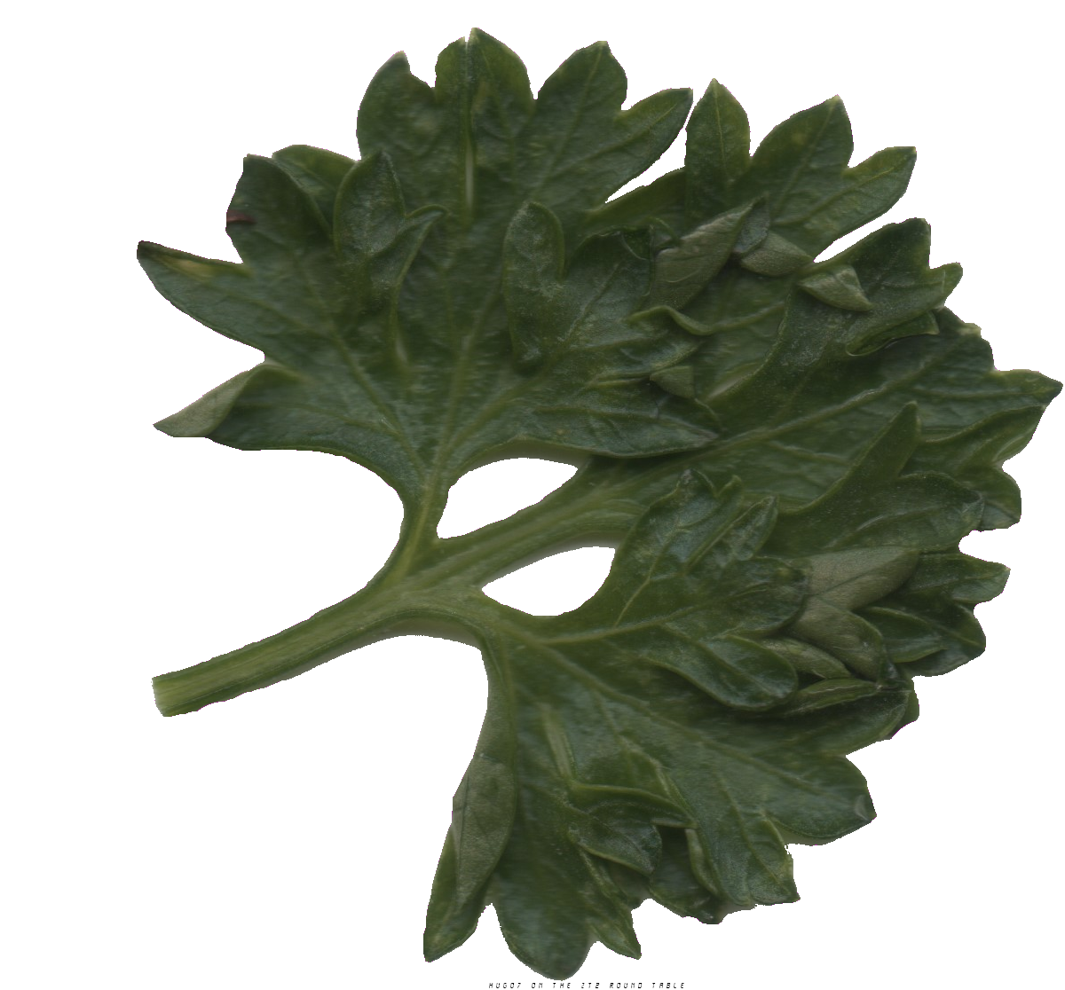 Petroselinum crispum - de mon propre jardin - passé au scanner en 1200ppp